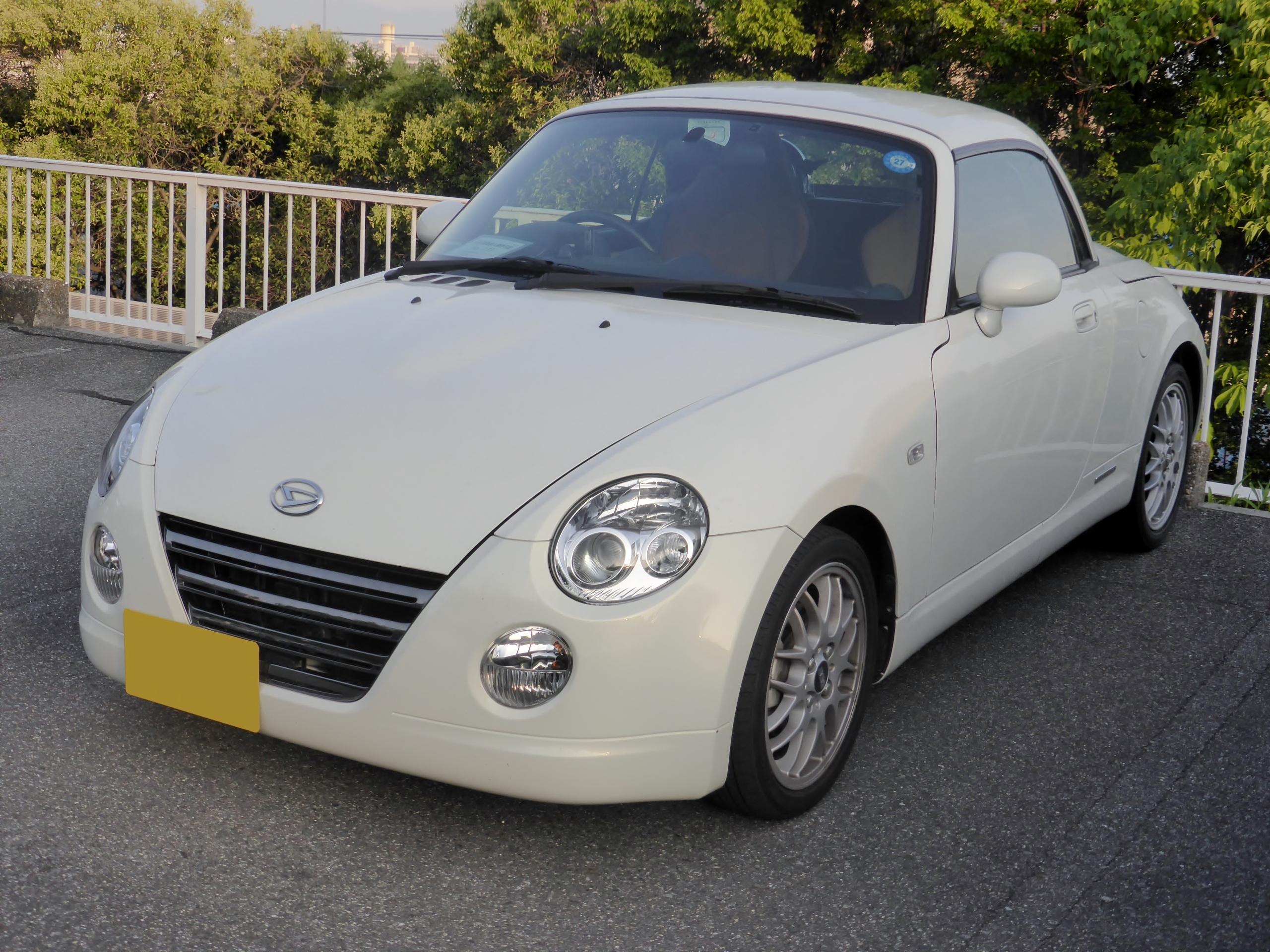 L880K型ダイハツ・コペンアルティメットエディションIIメモリアルをフロントから撮影。